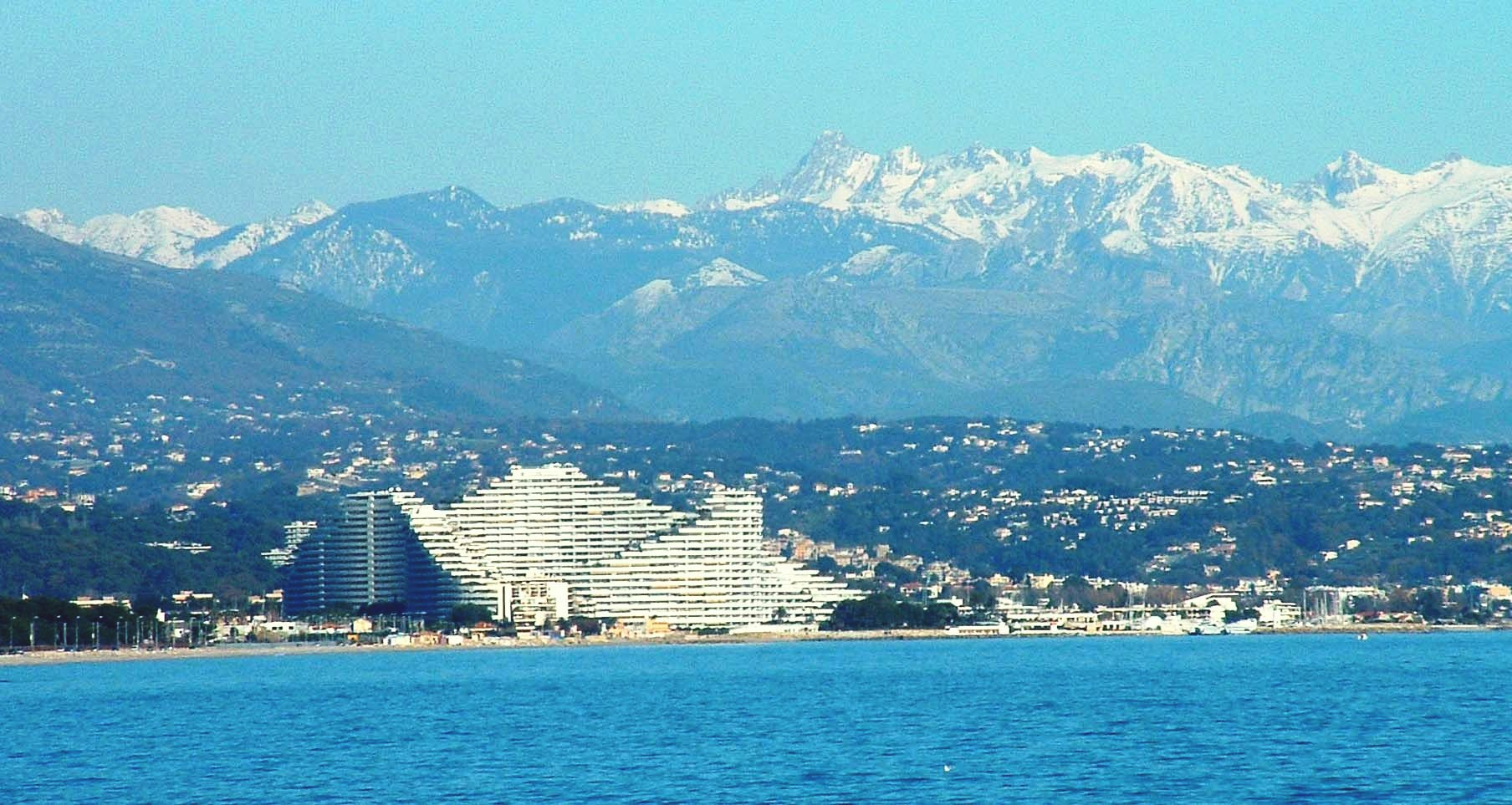 Villeneuve-Loubet - Marina Baie des Anges et la massif du Mercantour en hiver